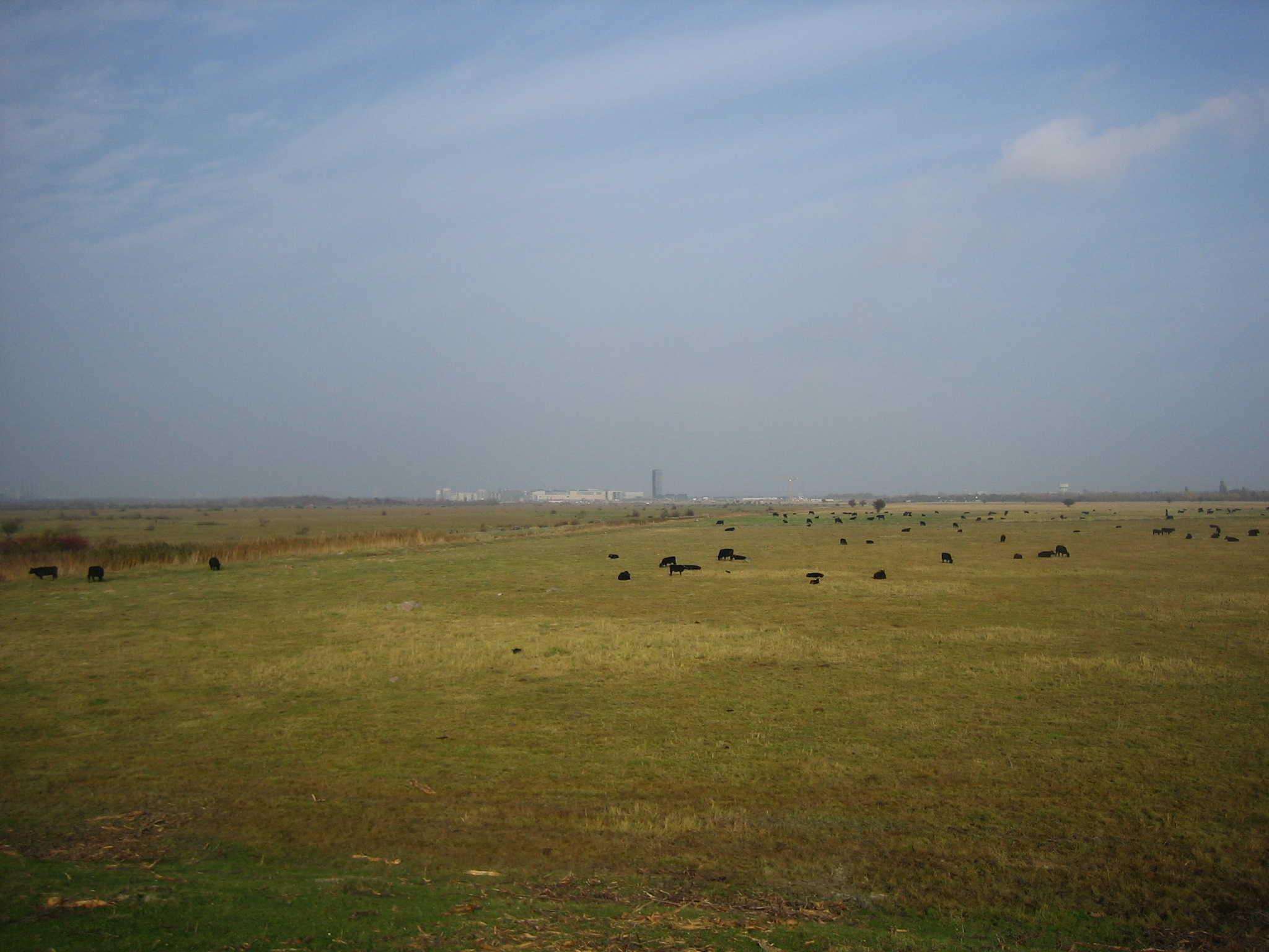 Kalvebod fælled fotograferet fra Ugandavej mod nord